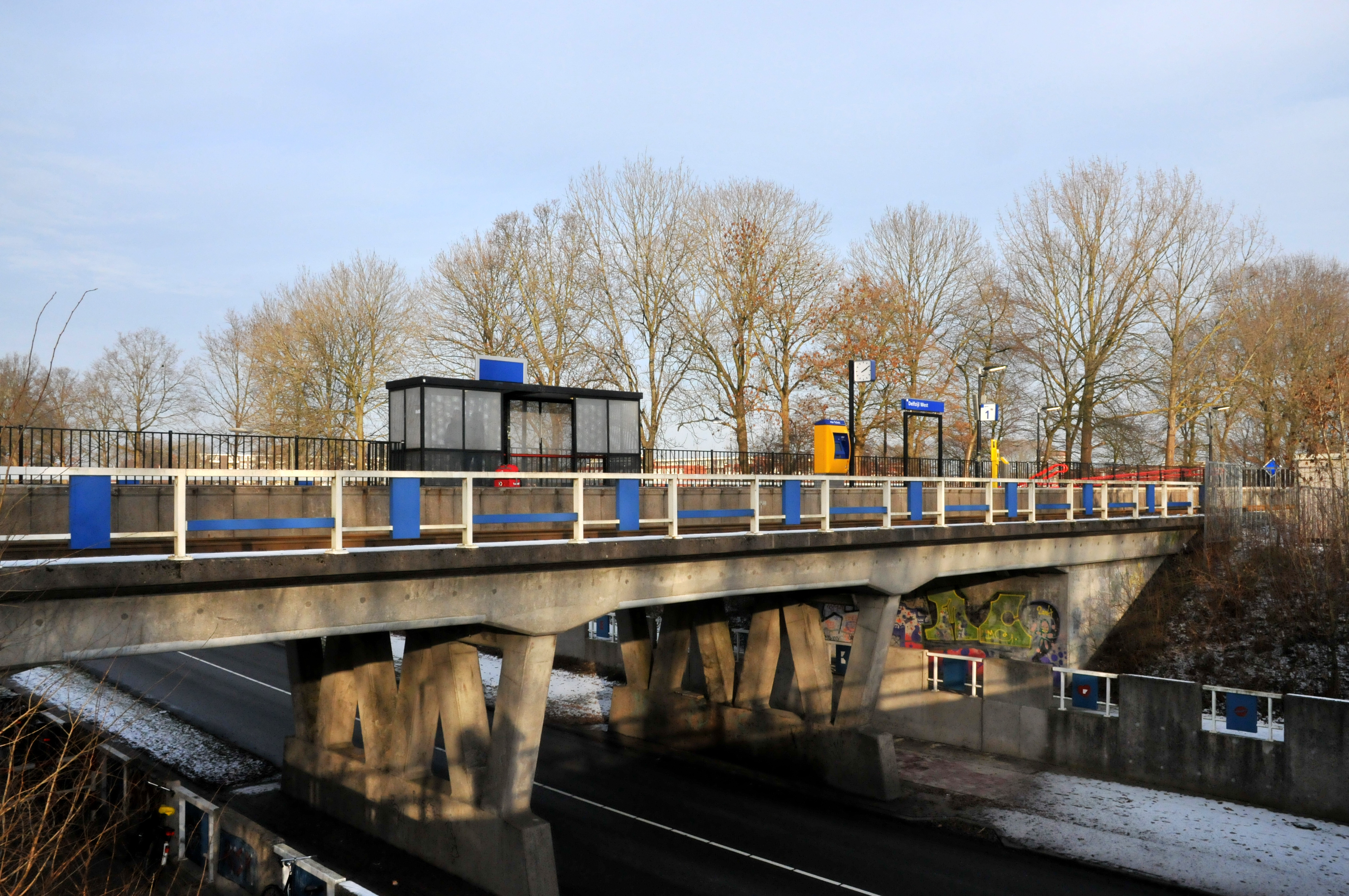 Station Delfzijl West op 5 januari 2011